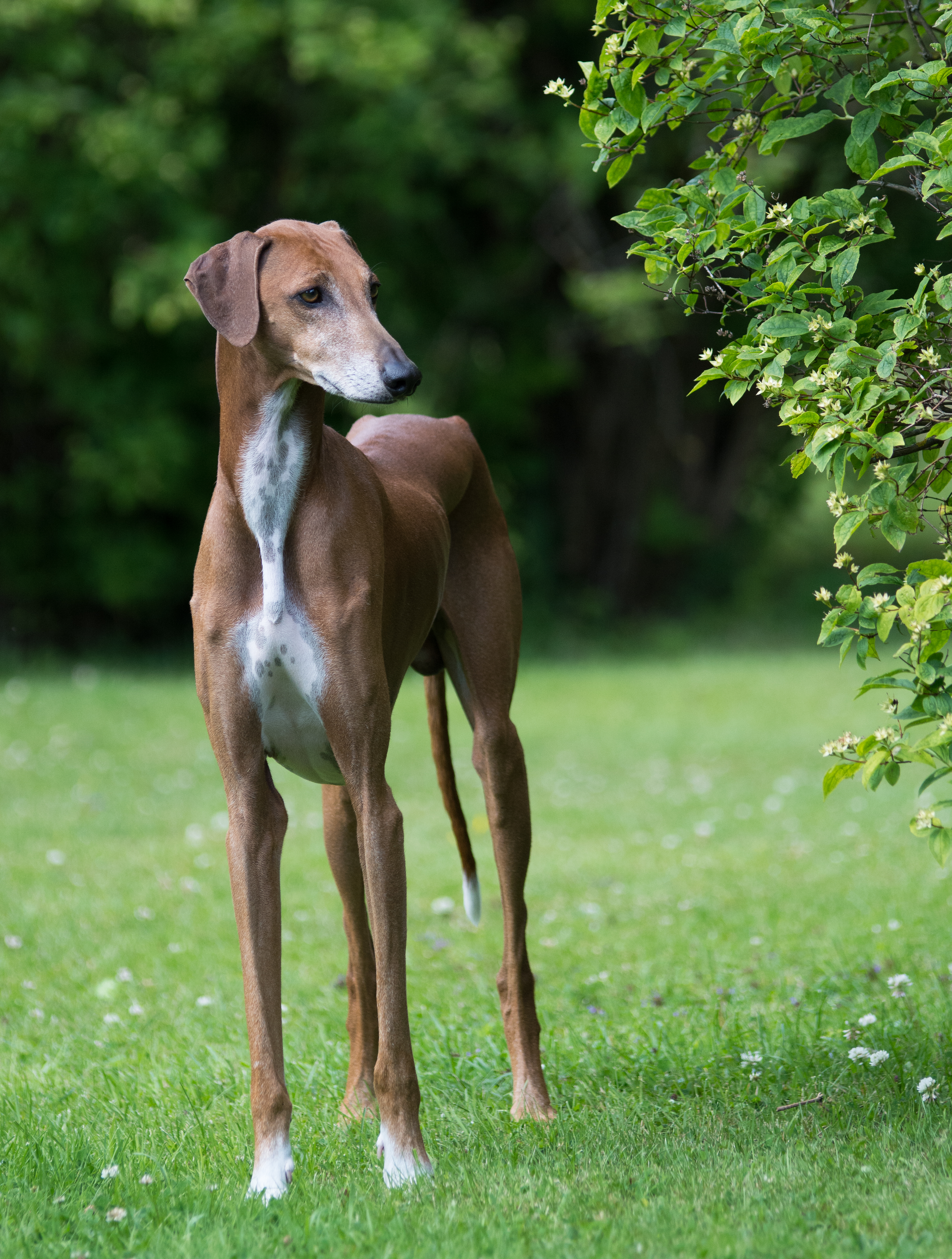 Azawakh